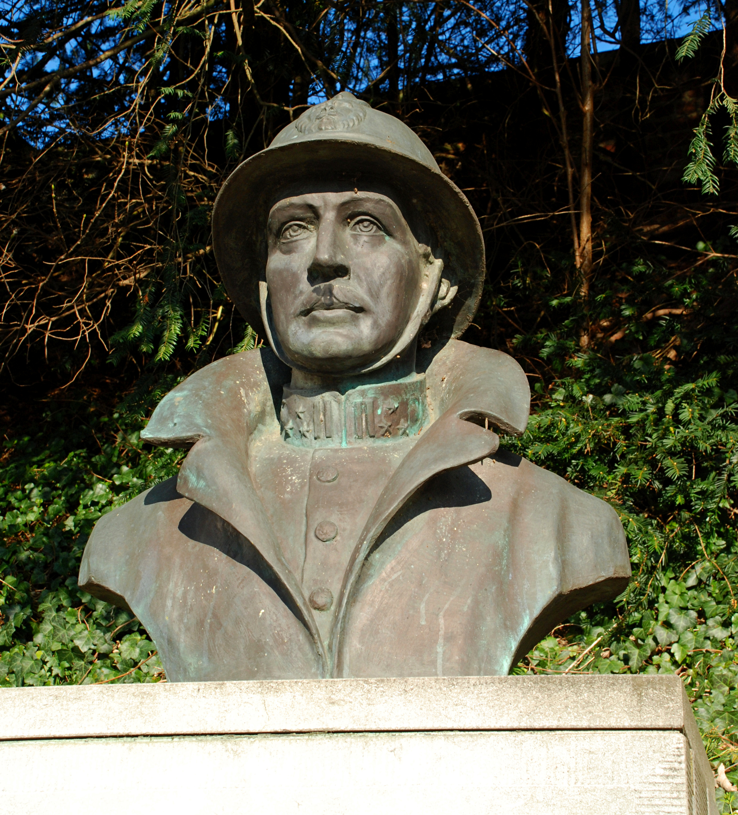 Albert 1er de Belgique - Ottignies - angle avenue du Roi Albert et avenue des Combattants This photo of immovable heritage has been taken in the Walloon Region